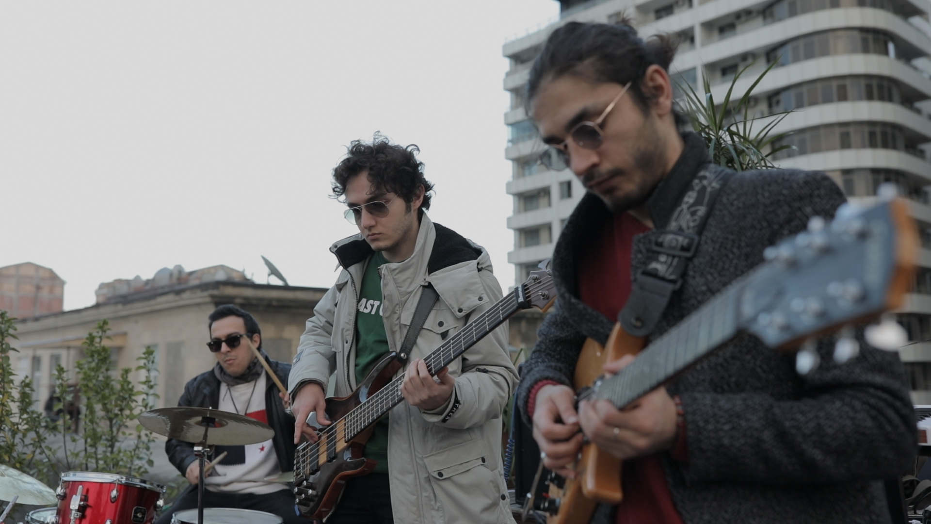 Ahmedowsky Trio qrupunun üzvləri